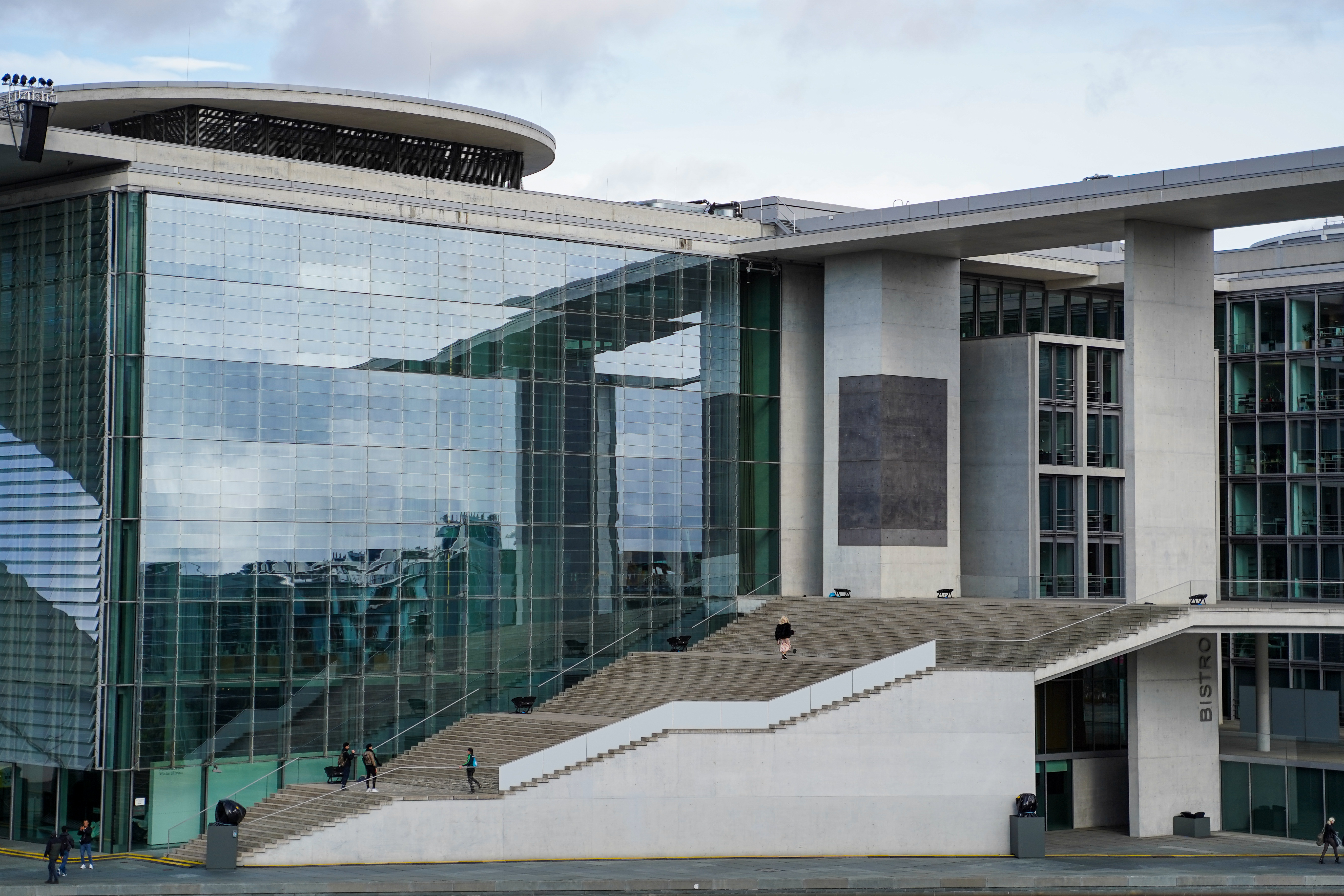 Marie-Elisabeth-Lüders-Haus (aufgenommen vom Balkon der Bestandsbibliothek des Reichstagsgebäudes).